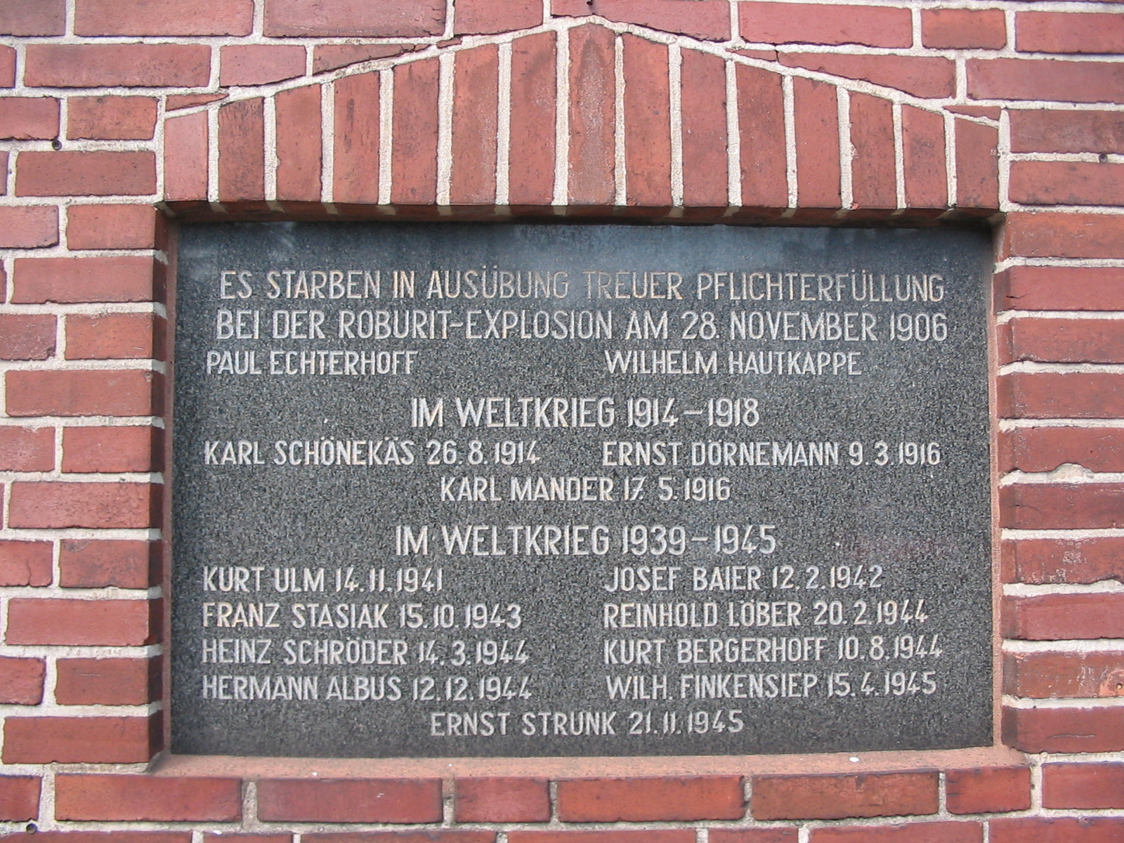 Gedenktafel an der Feuerwache der Freiwilligen Feuerwehr Altstadt in Witten